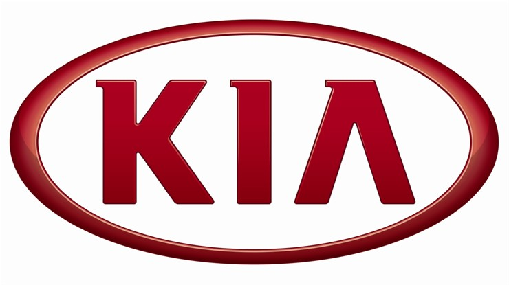 kia motors